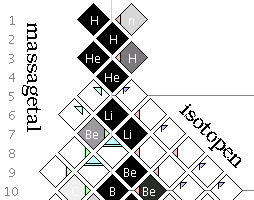 Fragment van nevenstaande isotopen-overzicht, ter verduidelijking van de assen. thumb